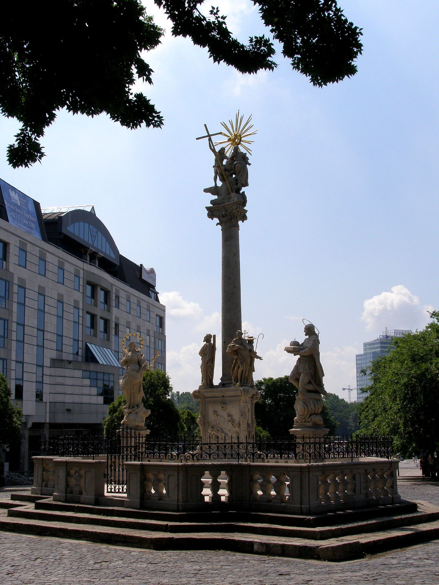 Trojičný stĺp z roku 1713 na Rybnom námestí v Bratislave. Celkový pohľad na stĺp